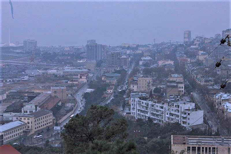 Баилово. Баку. Вид с Шахидляр Хиябаны. Ул. Красина. Вечер.